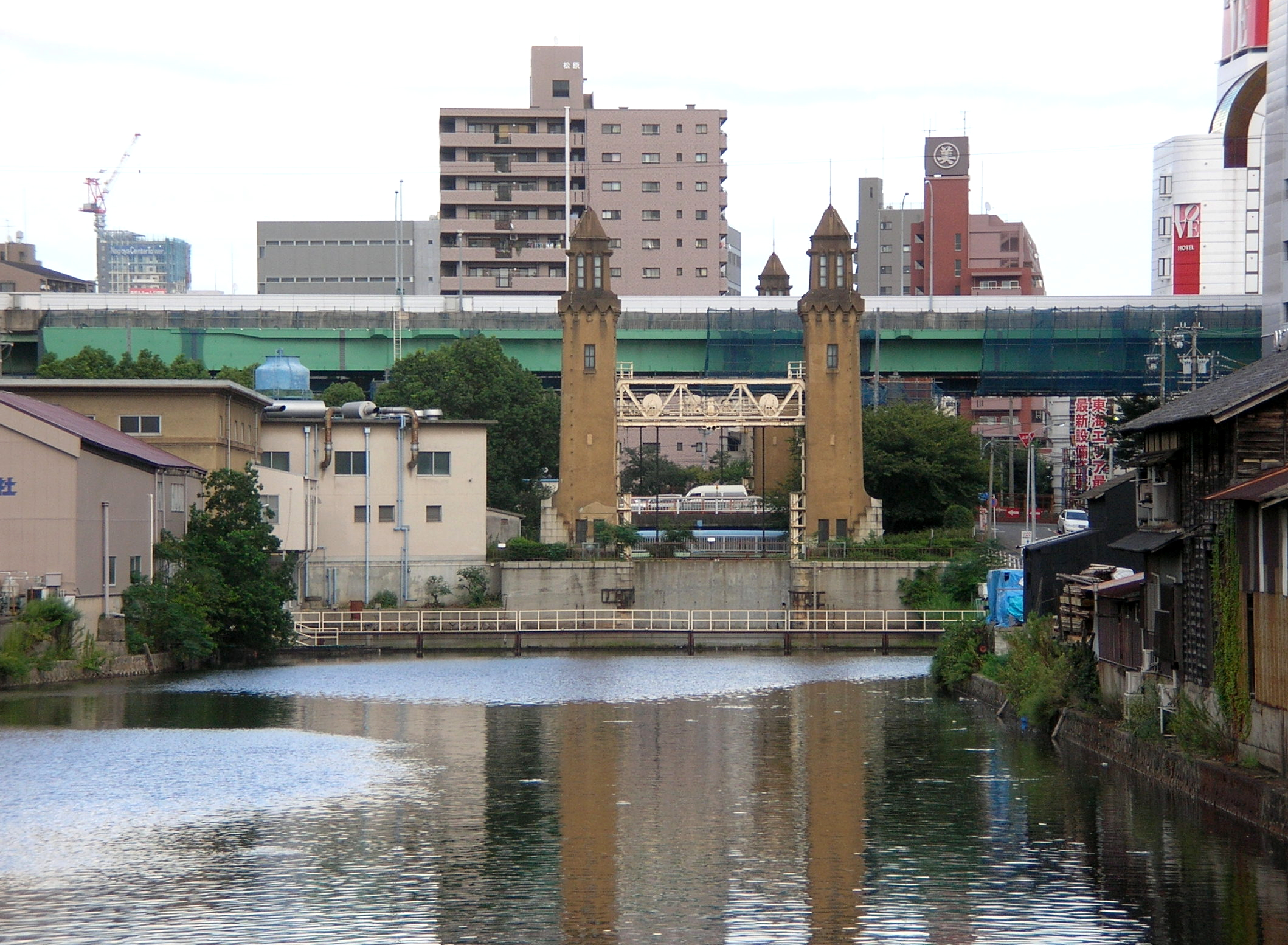 松重閘門と建設中の都心環状線と4号東海線の取り付け部